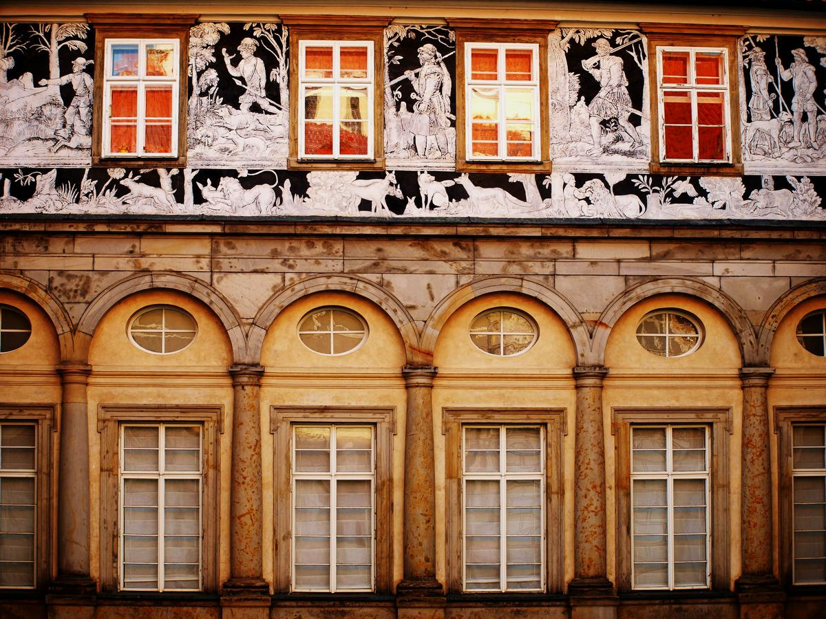 Zámek Brandýs - detail